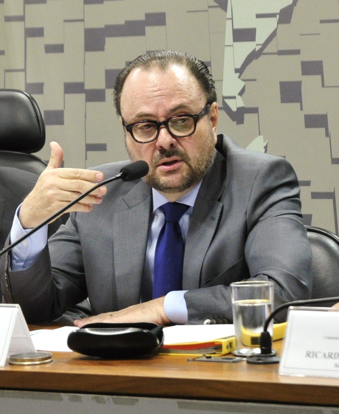 Mário Vilalva (* 1953 in Rio de Janeiro), brasilianischer Diplomat, seit 8. November 2016 Botschafter in Berlin. Foto: Geraldo Magela/Agência Senado